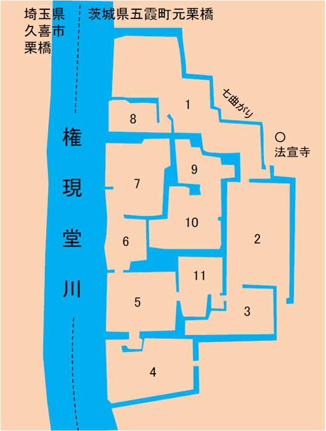 茨城県五霞町の栗橋城図 参考文献： 伊禮正雄 「栗橋城の歴史と構造」『戦国大名論集3 東国大名の研究』 吉川弘文館、昭和58年